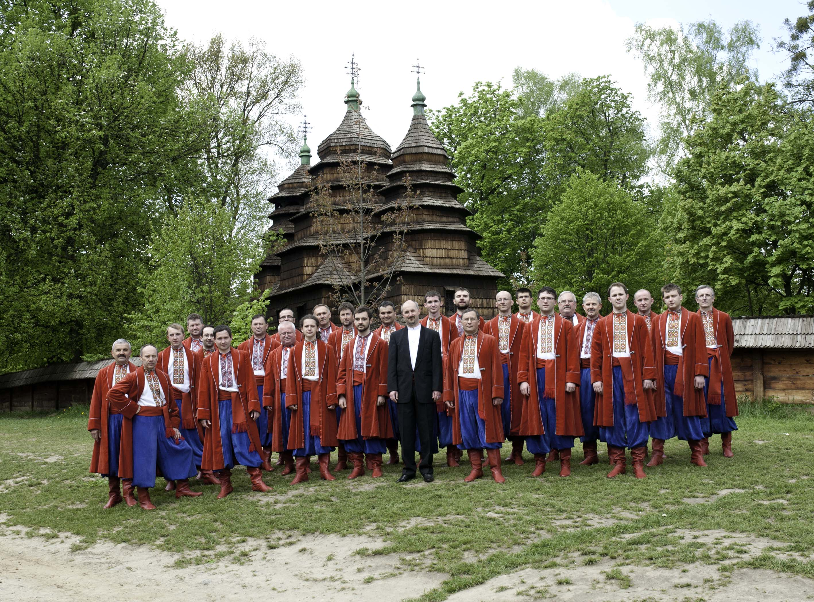 Ukraiński Chór Męski Żurawli na Ukrainie w 2011 r.